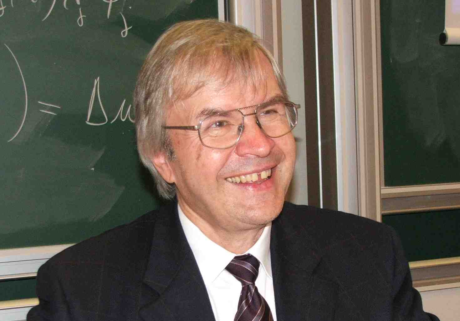 Own photo of Nobel-prize winner Theodor W. Hänsch (version jpeg) Photo prise lors de la conférence "Passion for Precision", remake de celle donnée à Stockholm pour sa réception du prix Nobel de physique 2005, donnée le 20 octobre 2006 à l'Ecole Polytechnique.